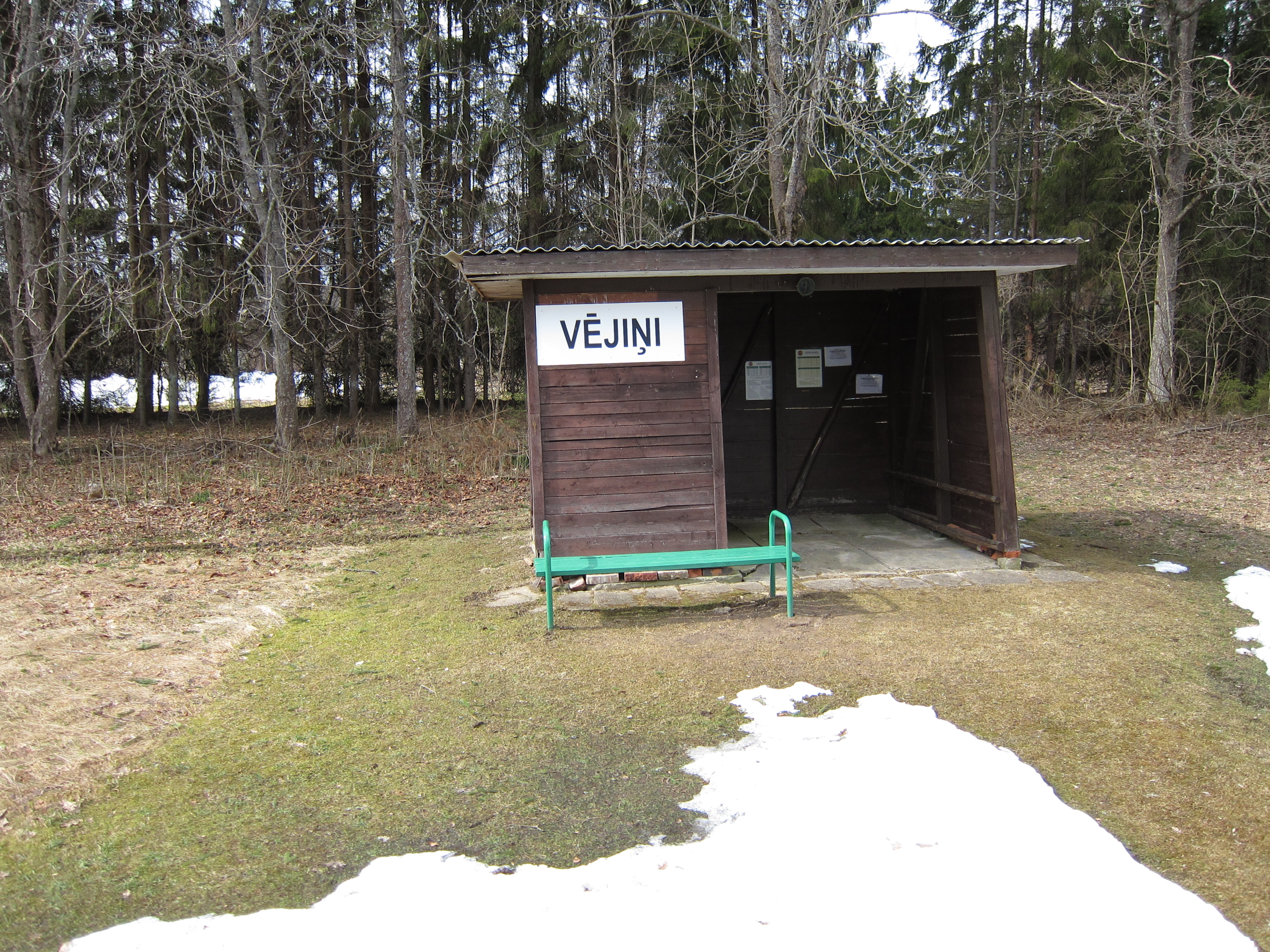 Vējiņu pieturas nojume